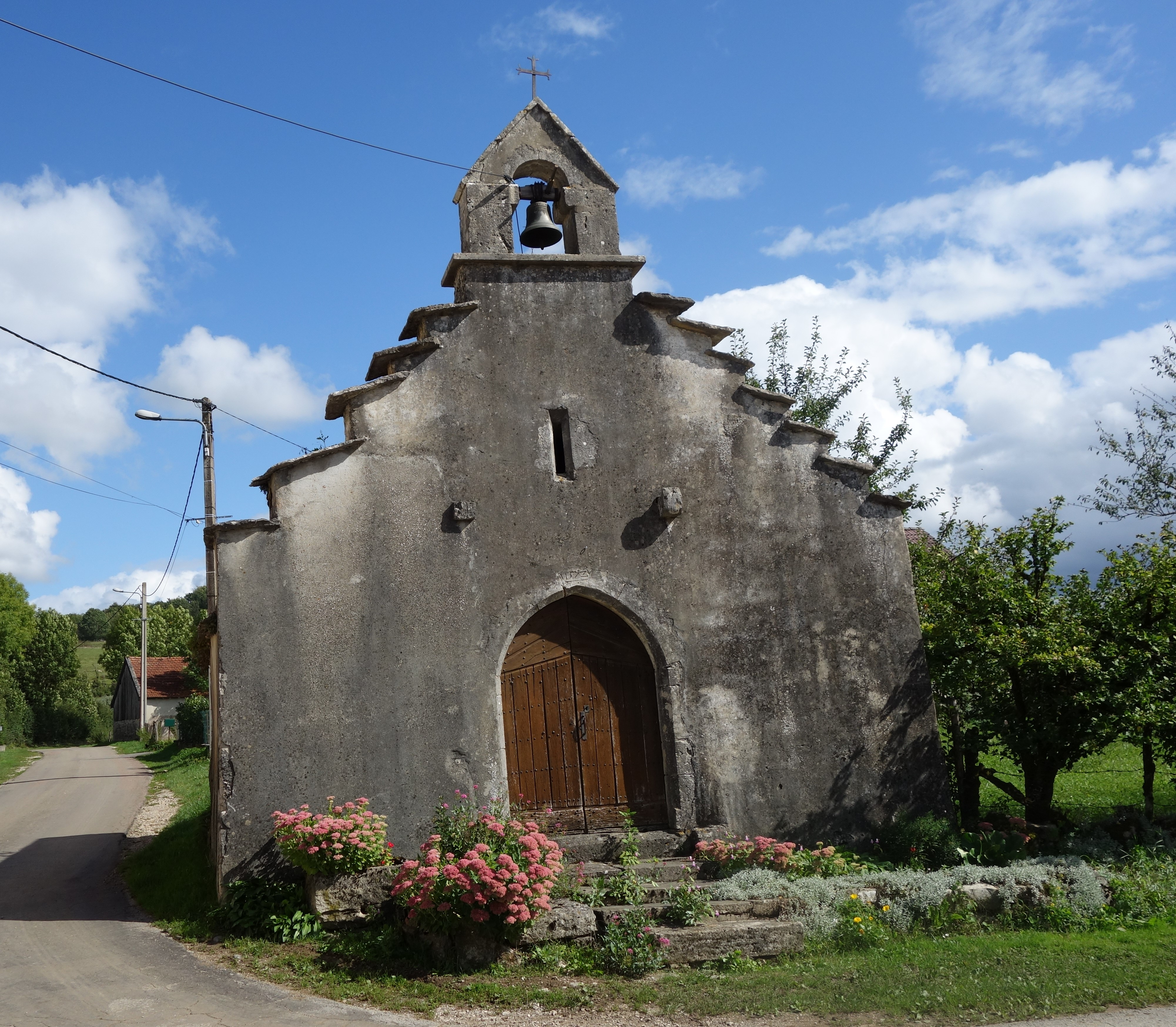 Charézier - Chapelle Saint-Sauveur (hameau de Lieffenans) - Jura